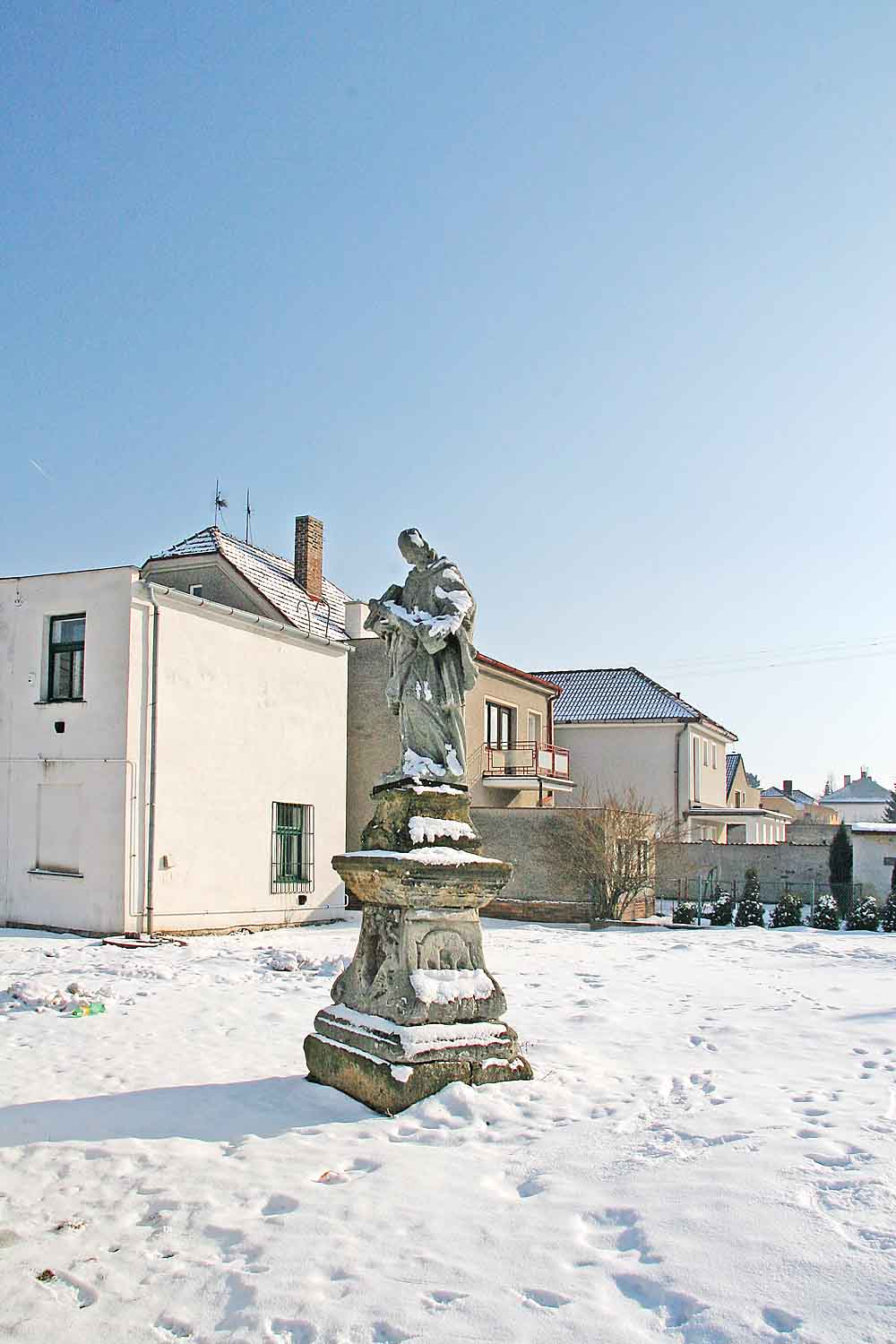 Barokní socha Sv. Jana Nepomuckého v Řečanech nad Labem, District Pardubice, Czech Republic Autor:Prazak Date: 6. 2. 2006